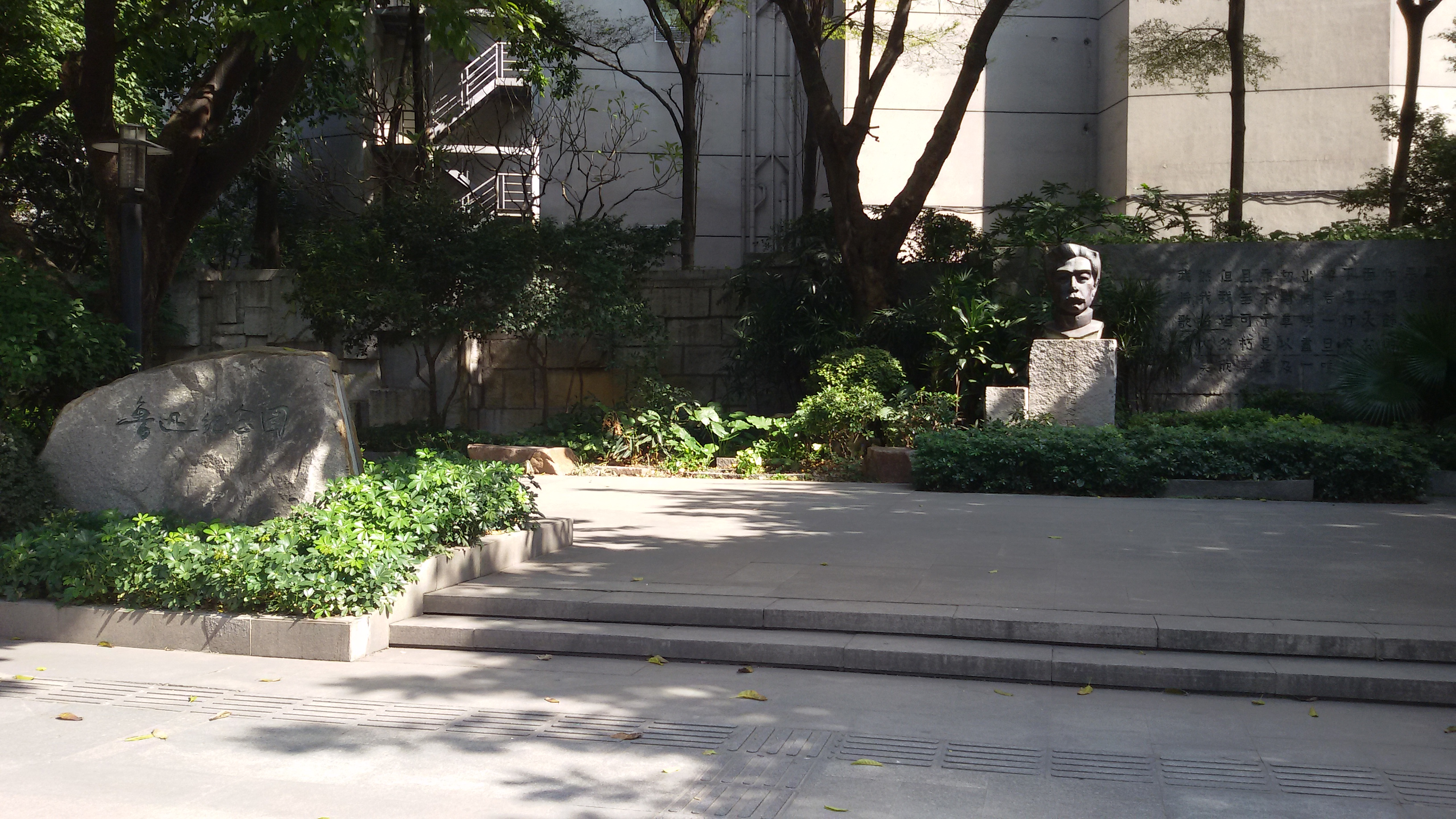 粵語: 魯迅紀念園